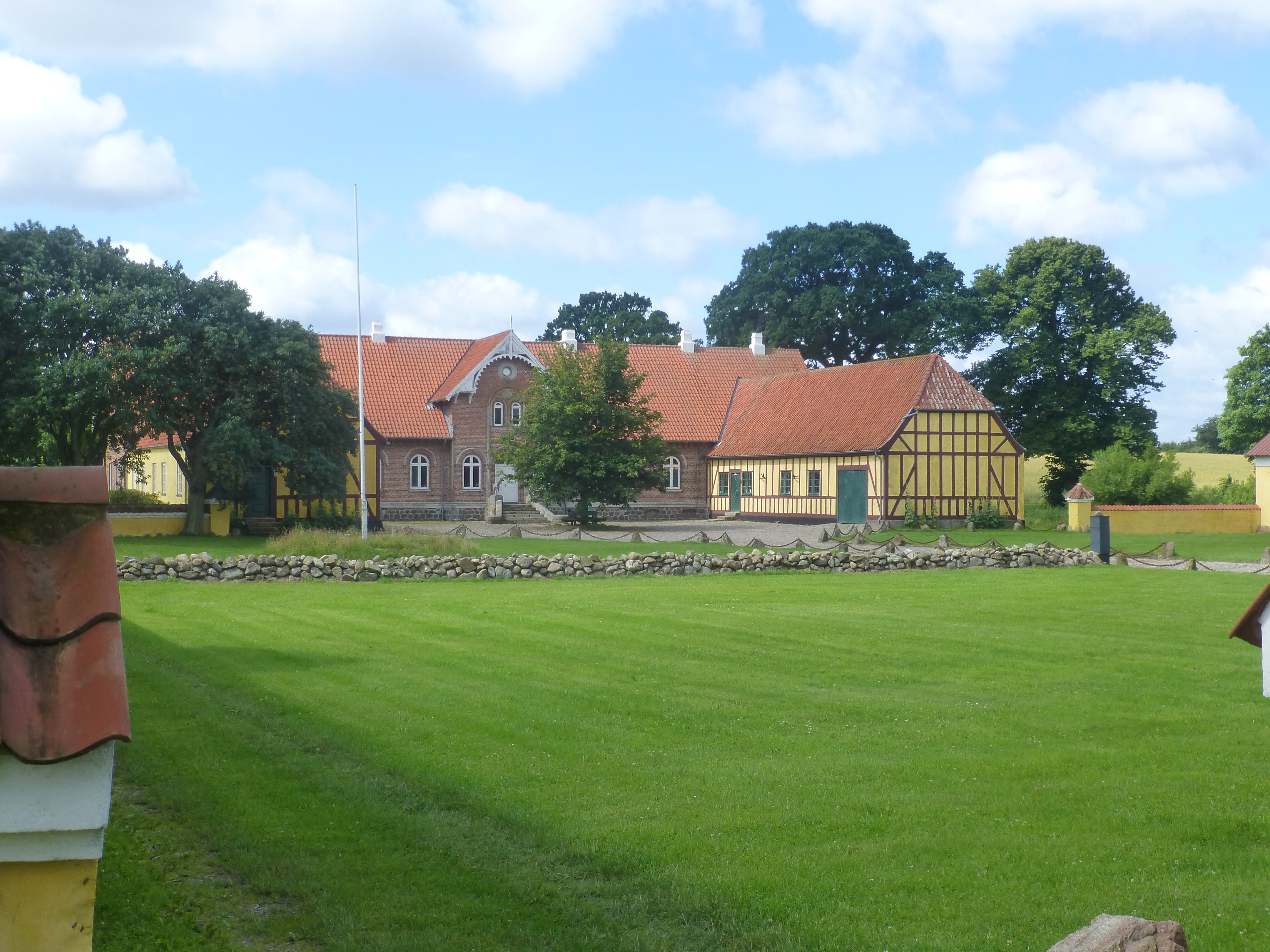 Rolsøgaard set fra nord